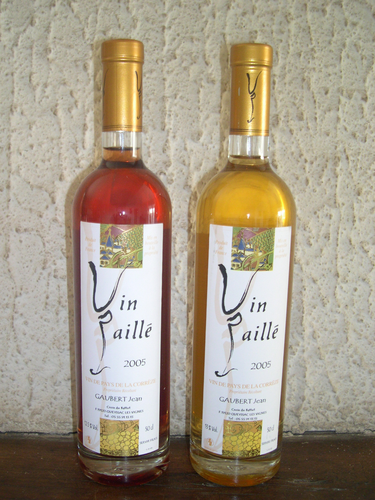 Photographie de deux bouteilles de vin paillé l'une contenant du vin rouge l'autre du vin blanc.